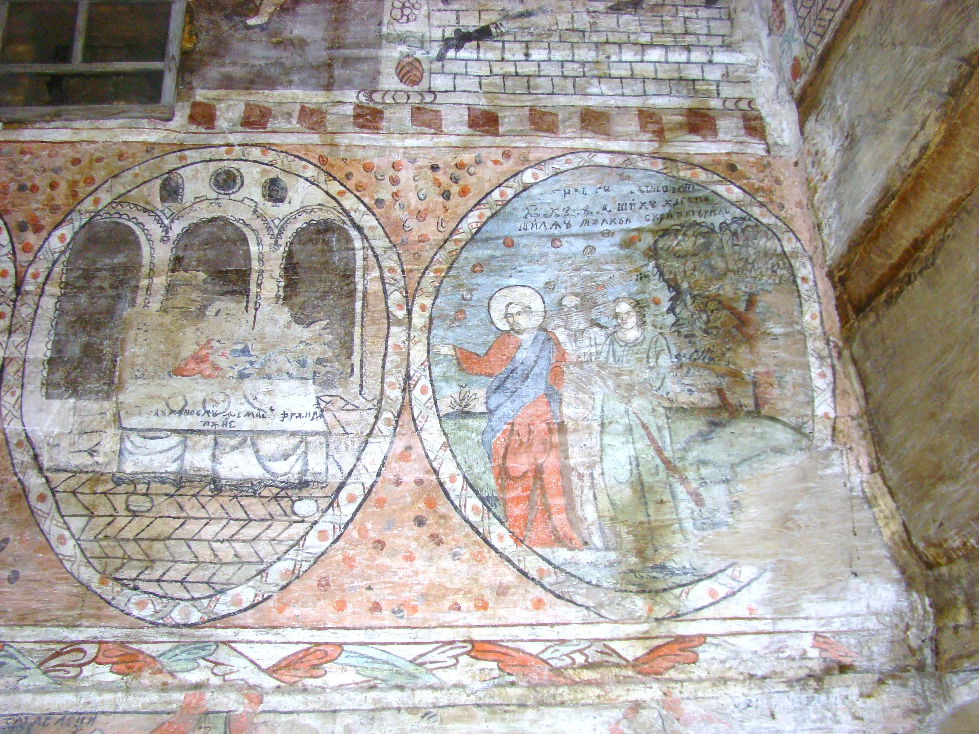 Biserica de lemn "Intrarea Maicii Domnului în Biserică" , sat BÂRSANA